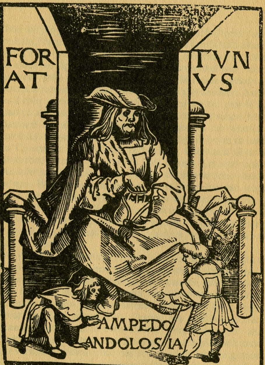 Titelbild der Ausgabe des Fortunatus von 1509